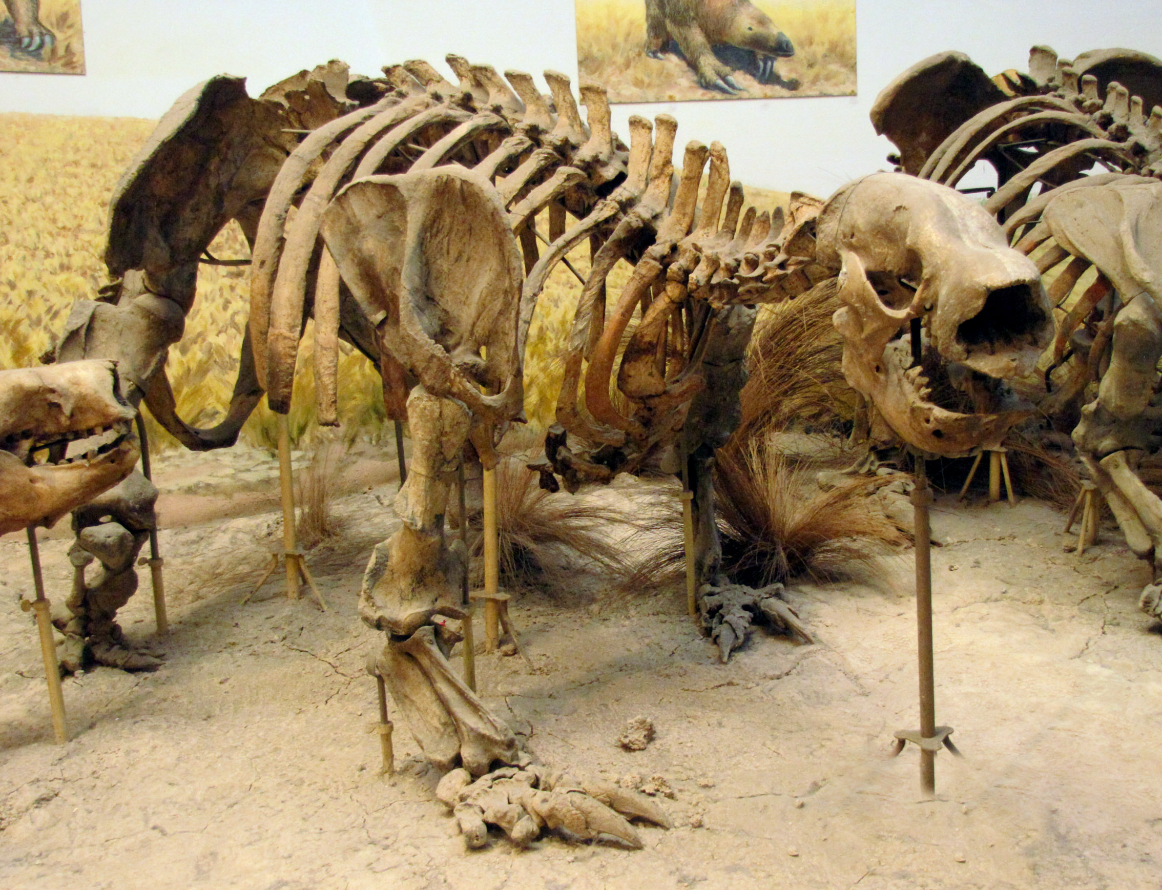 Esqueleto de un Glosoterio adulto (Glossotherium robustum) Proviene de excavaciones y afloramientos en las mágenes de ríos y arroyos de la Provincia de Buenos Aires. Museo de Ciencias Naturales de La Plata.